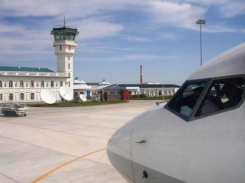 Перрон аэропорта Маньчжурии Сицзяо, Внутренняя Монголия, Китай